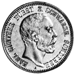 Karel Günther van Schwarzburg-S. - scan van een oude munt van een niet meer bestaand land